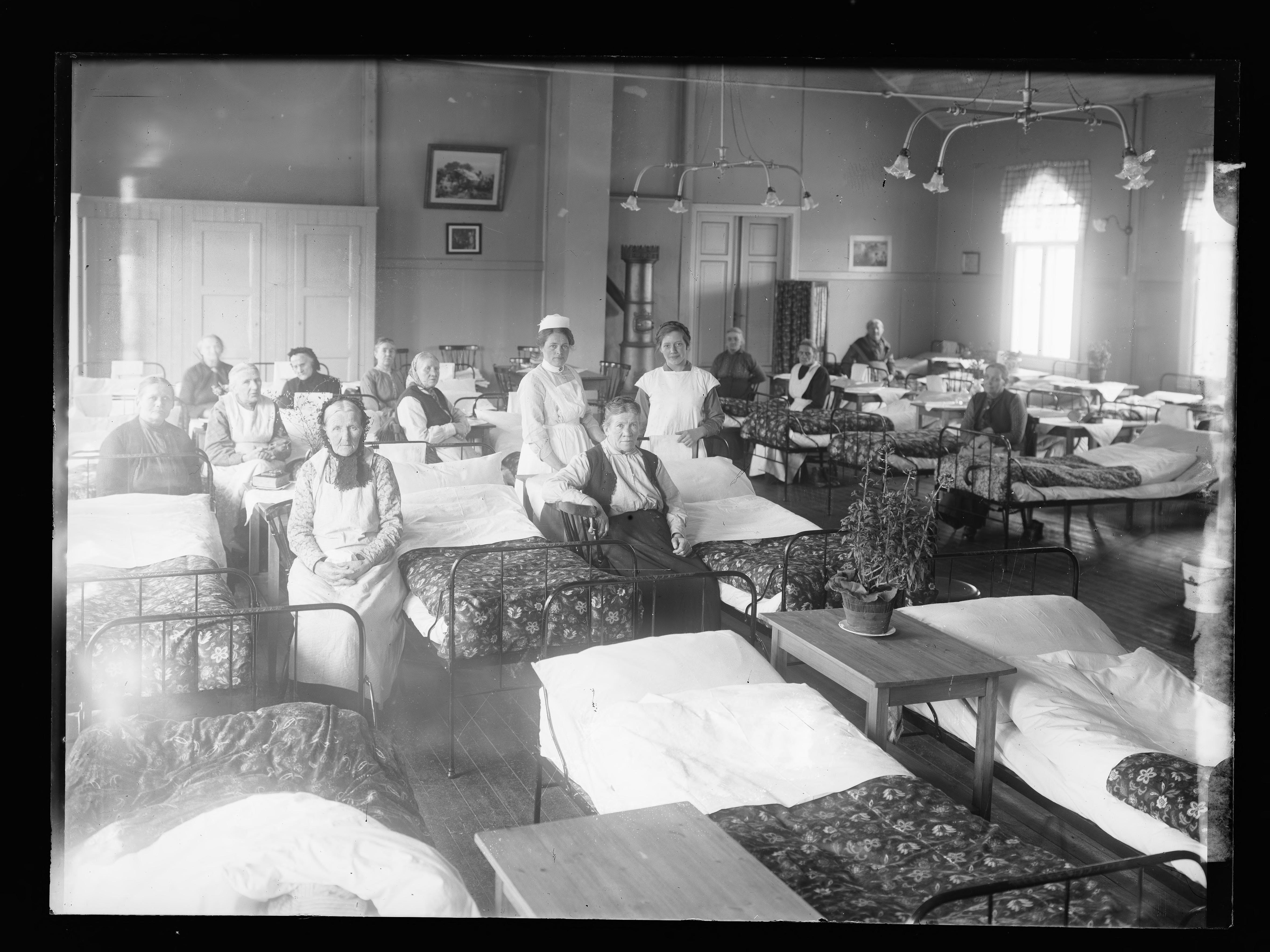 Bildet er hentet fra Nasjonalbibliotekets bildesamling. Anmerkninger til bildet var: Påskrift arkivark: Gamlehjemmet Enerhaugen Eldste arkivnummer: 239 Enerhaugen,Oslo, Oslo, Oslo